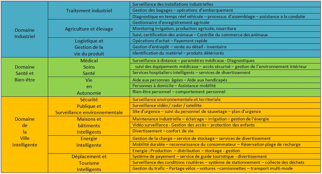 Usages